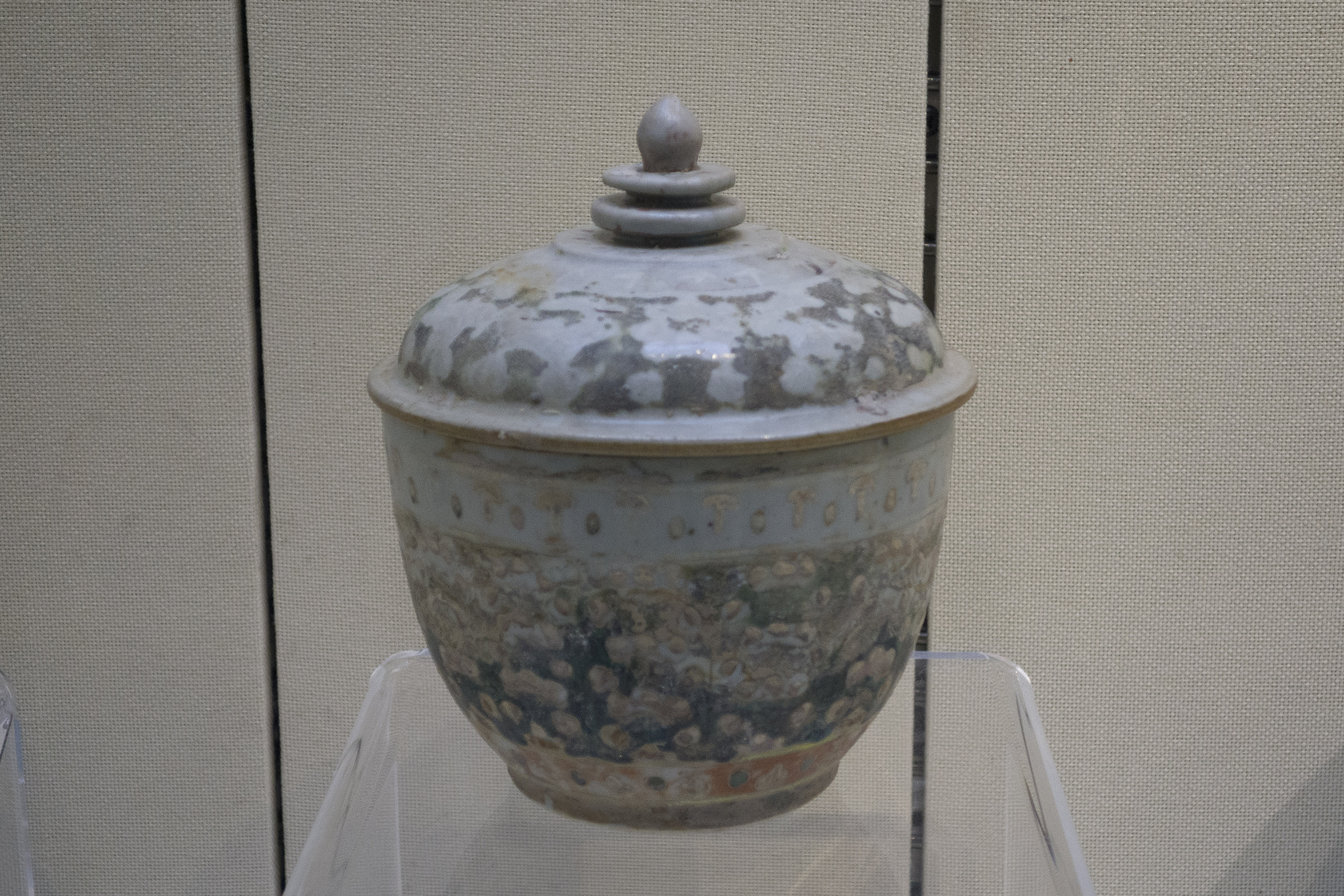 “小白礁一号”出水五彩罐